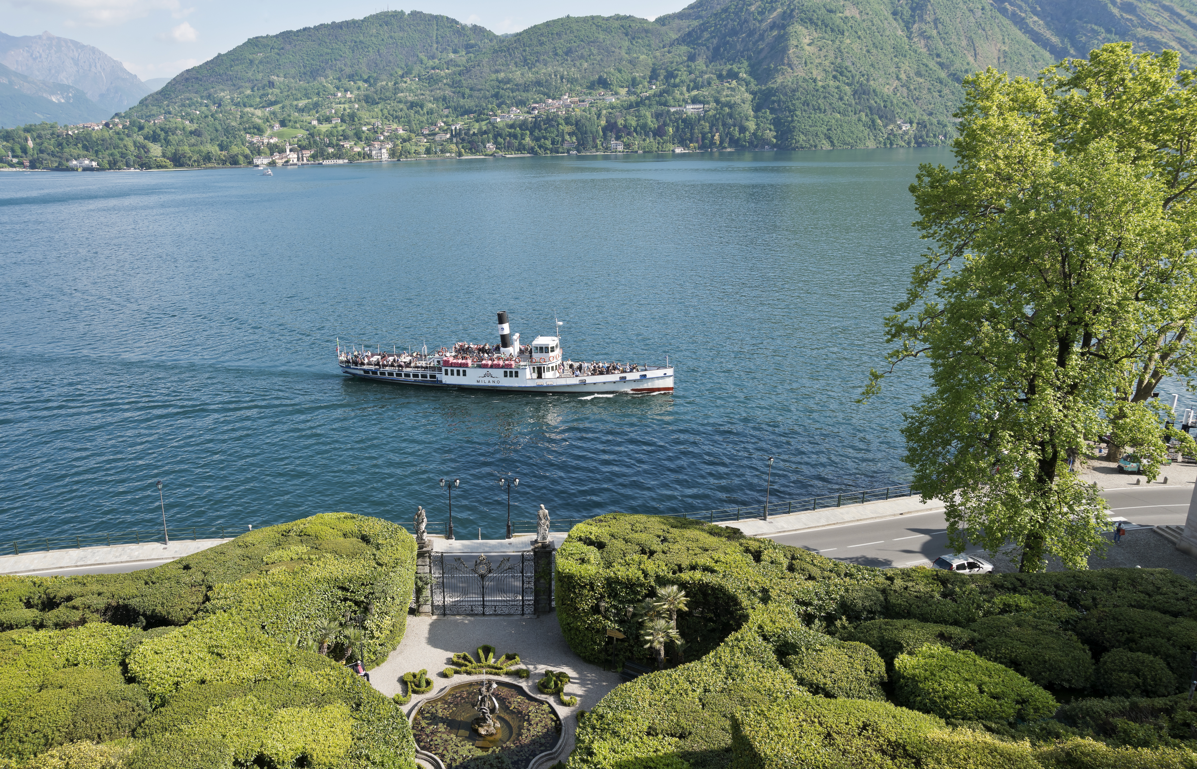 Villa Carlotta - museo e giardino botanico This is a photo of a monument which is part of cultural heritage of Italy.